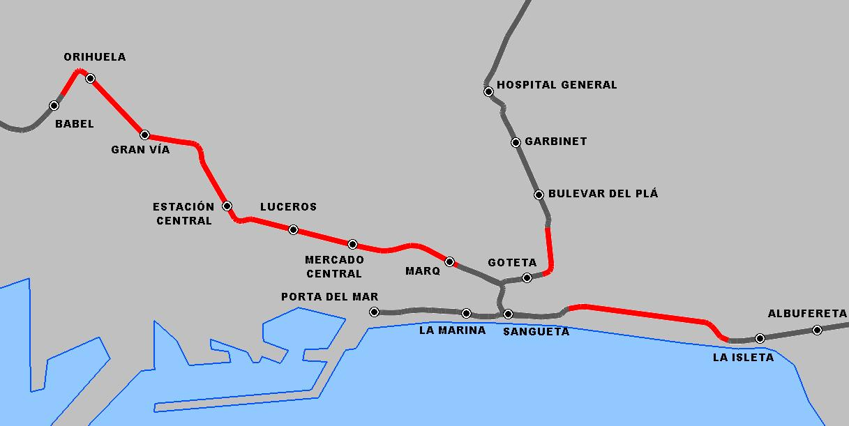 Recorrido más centrico del TRAM por la ciudad de Alicante, diferenciando en rojo los tuneles